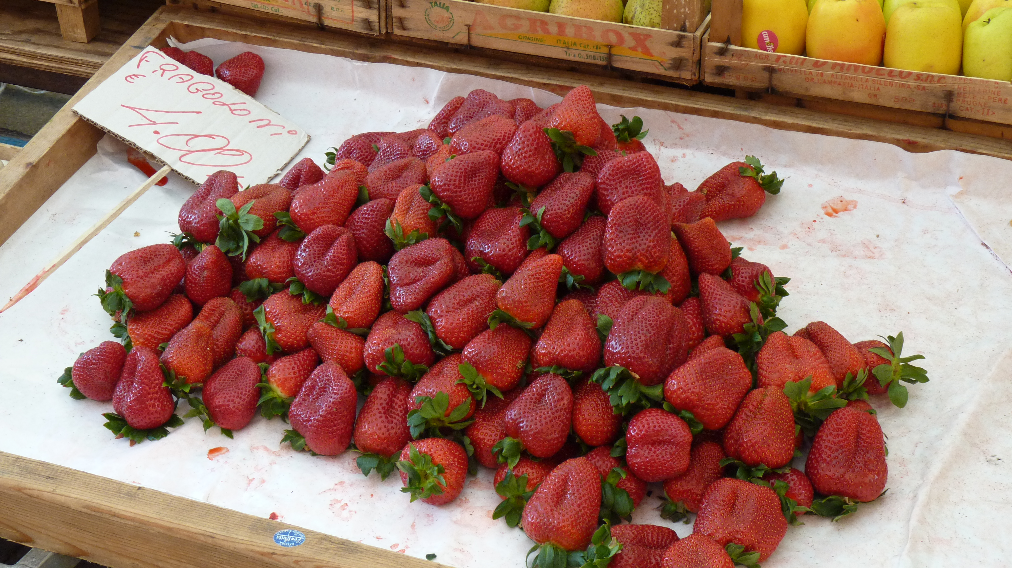 Fragole siracusane